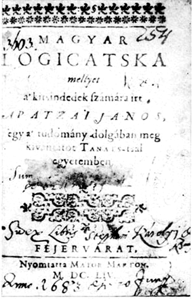 Apáczai Csere János: A Magyar logicatska (Gyulafehérvár, 1654) címlapja